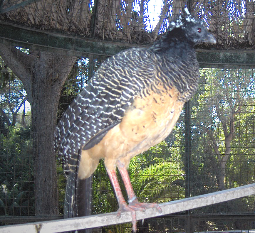 female Bare-faced Curassow (Crax fasciolata) (or possibly Crax fasciolata fasciolata) at a minizoo in Cascais, Portugal